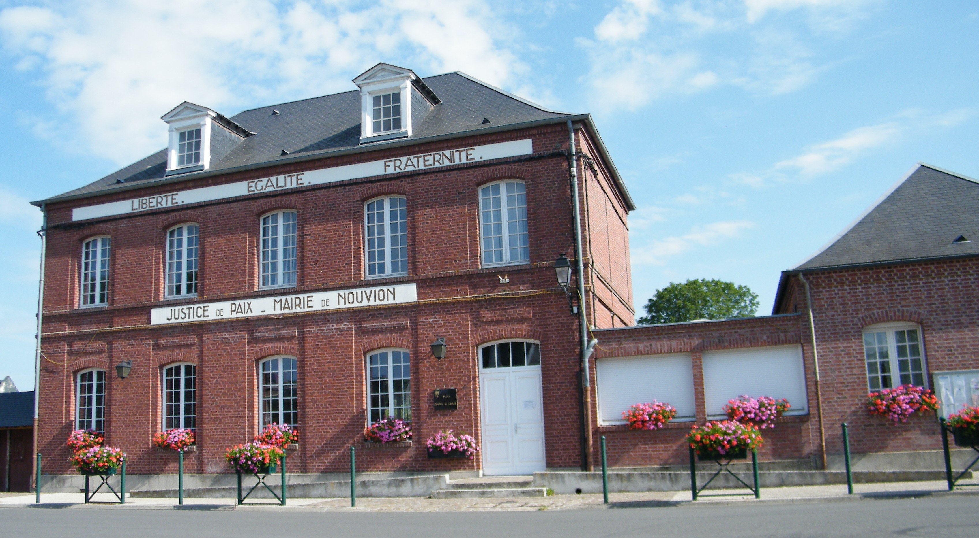 Nouvion, Somme, Fr, mairie, salle communale, place Général De gaulle.